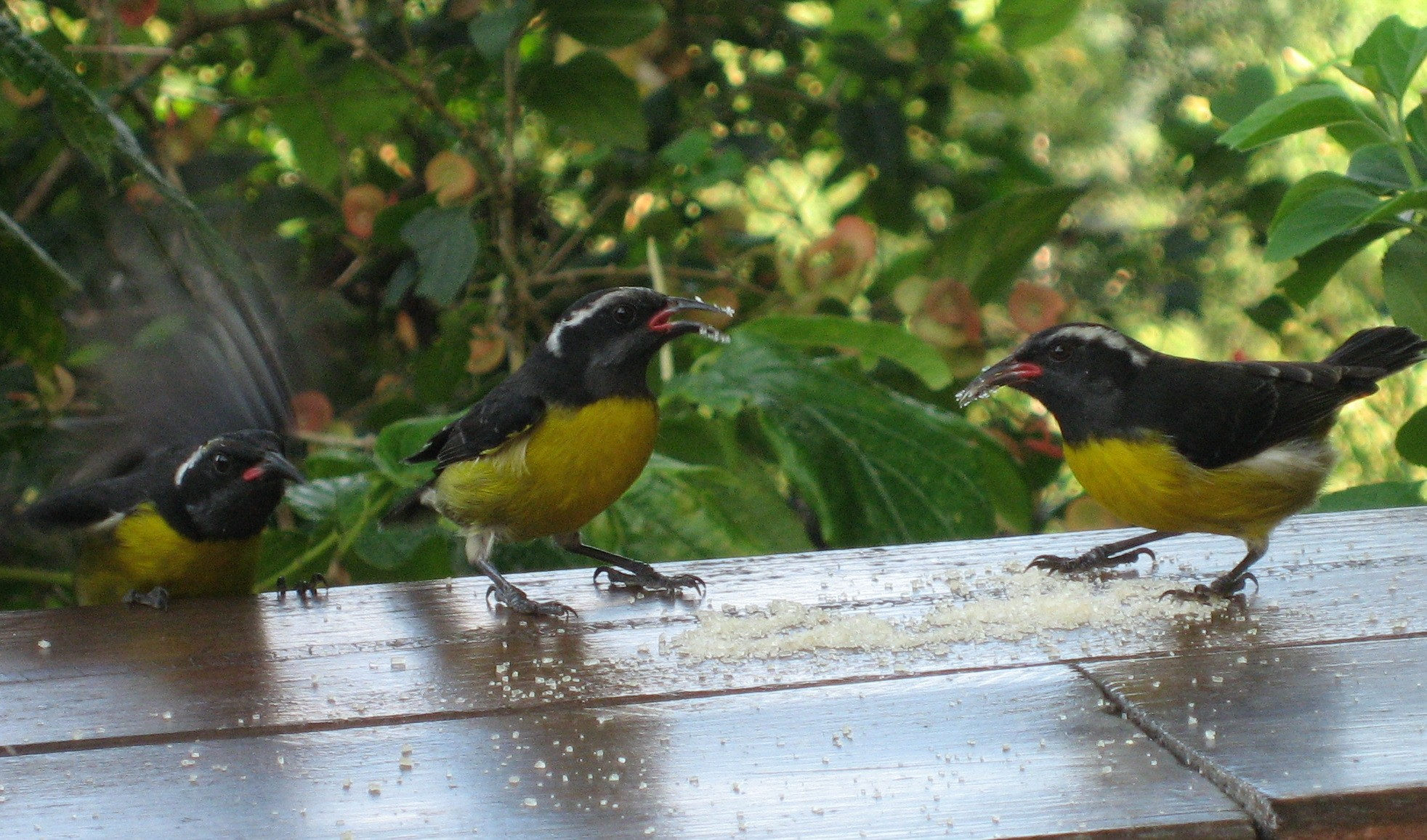 Coereba flaveola au Parc des Mamelles en Guadeloupe, Basse-Terre